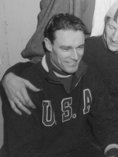 Skøyteløperne Delbert Lamb